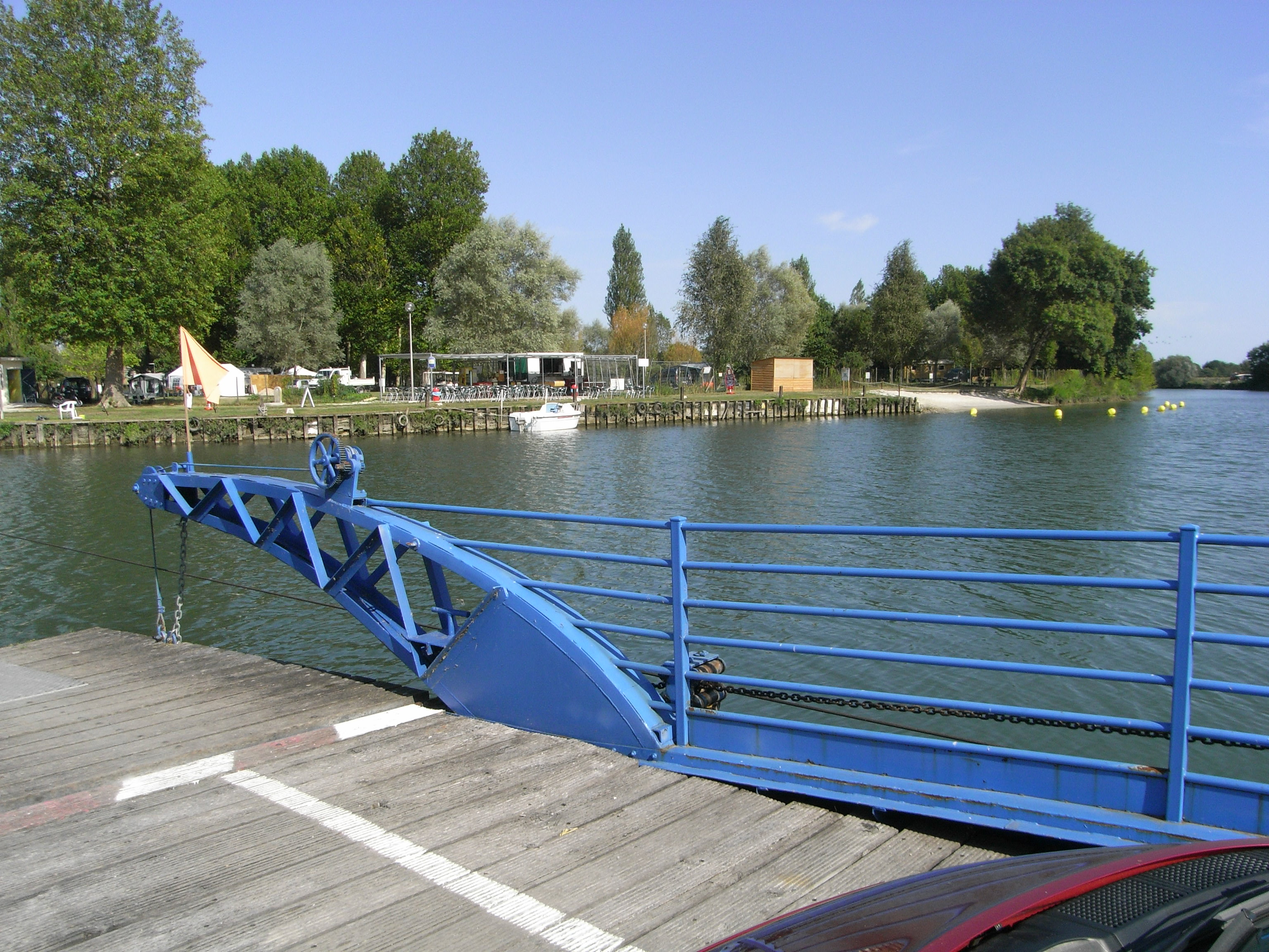 Bac à chaine motorisé sur la Charente entre les communes de Chaniers et de Courcoury en Charente-Maritime (France). Au fond, on aperçoit la plage de Chaniers.